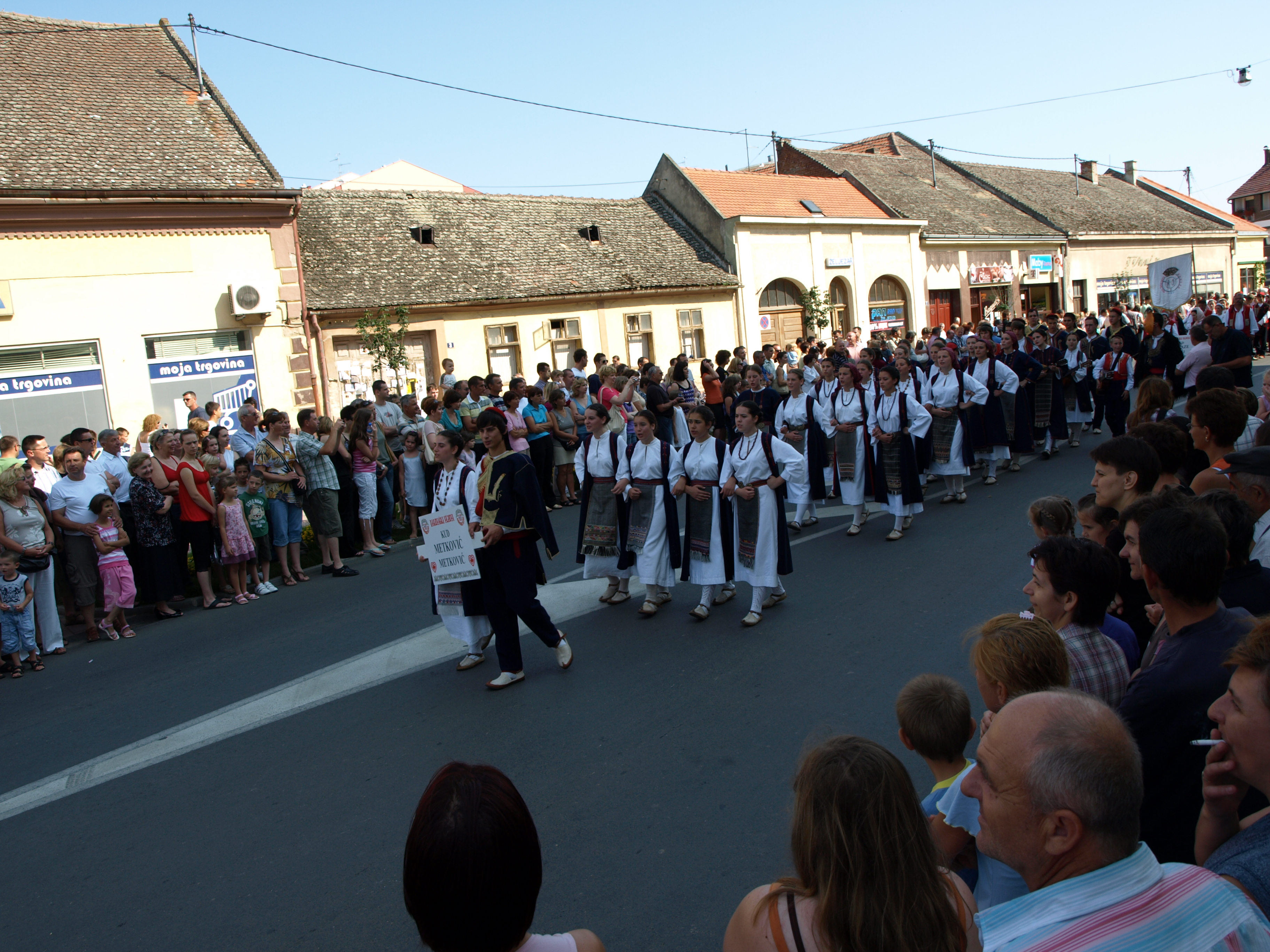 Detalj sa povorke folklornih skupina prigodom Đakovačkih vezova 2009. godine. Na fotografiji je KUD Metković.